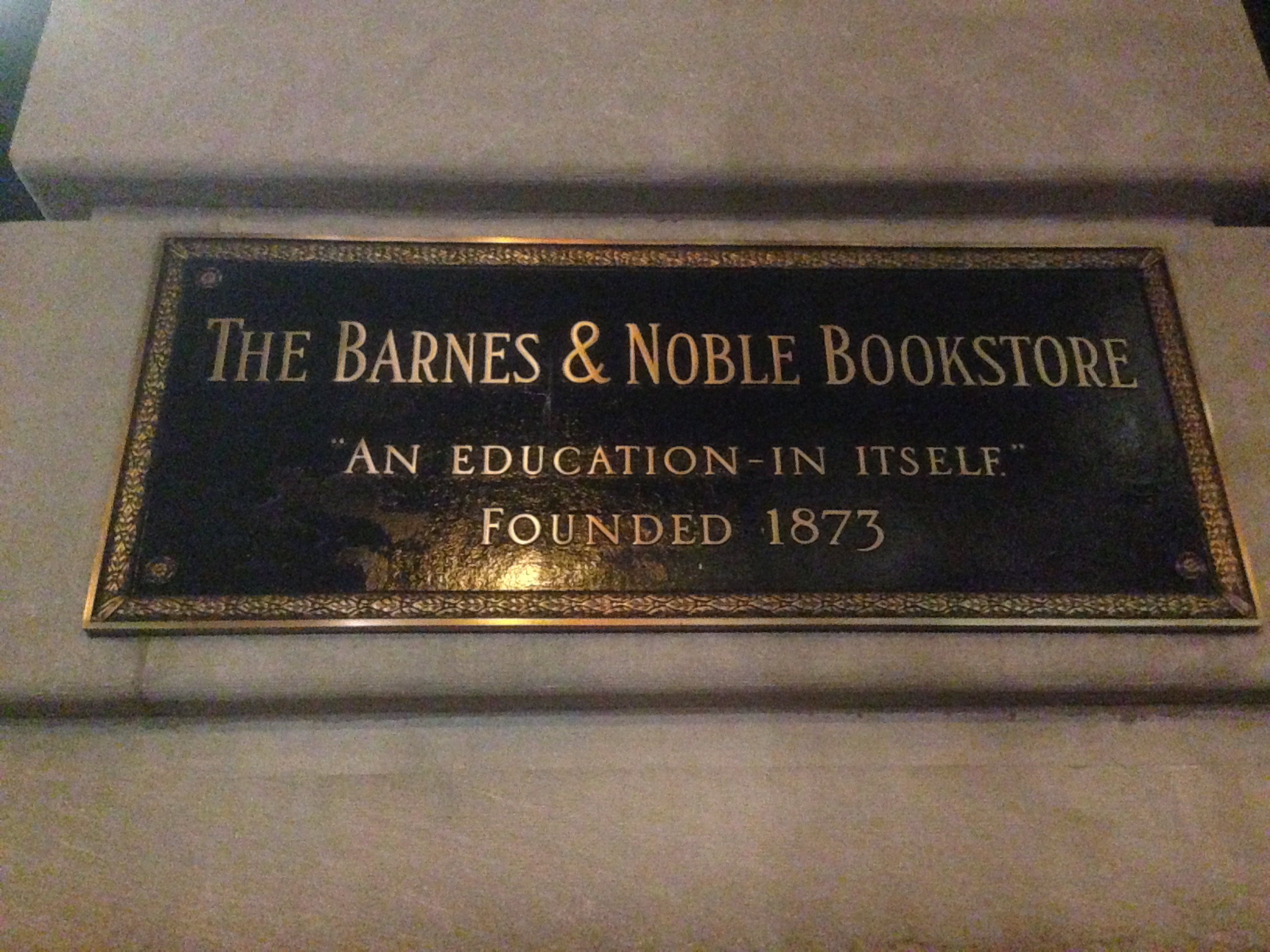 Barnes & Noble sign, NYC